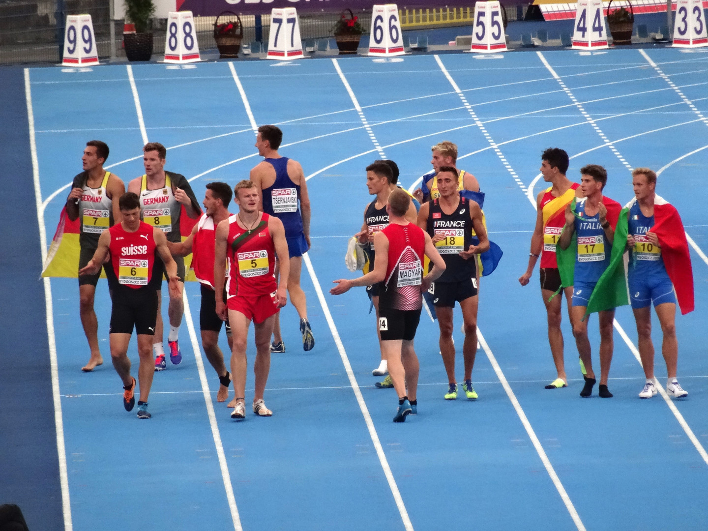 Młodzieżowe Mistrzostwa Europy w Lekkoatletyce U23 w Bydgoszczy 2017; dziesięciobój mężczyzn, bieg na 1500 m finał